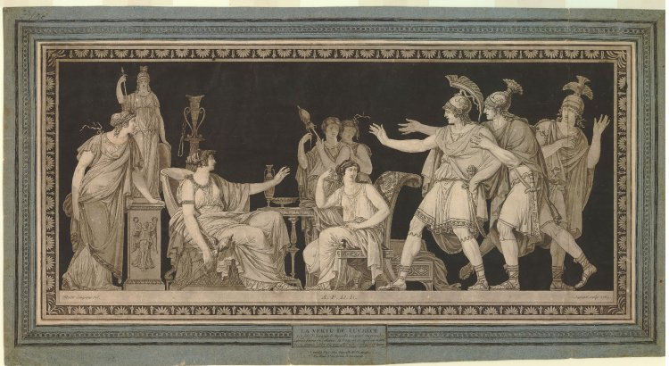 La vertu de Lucrèce